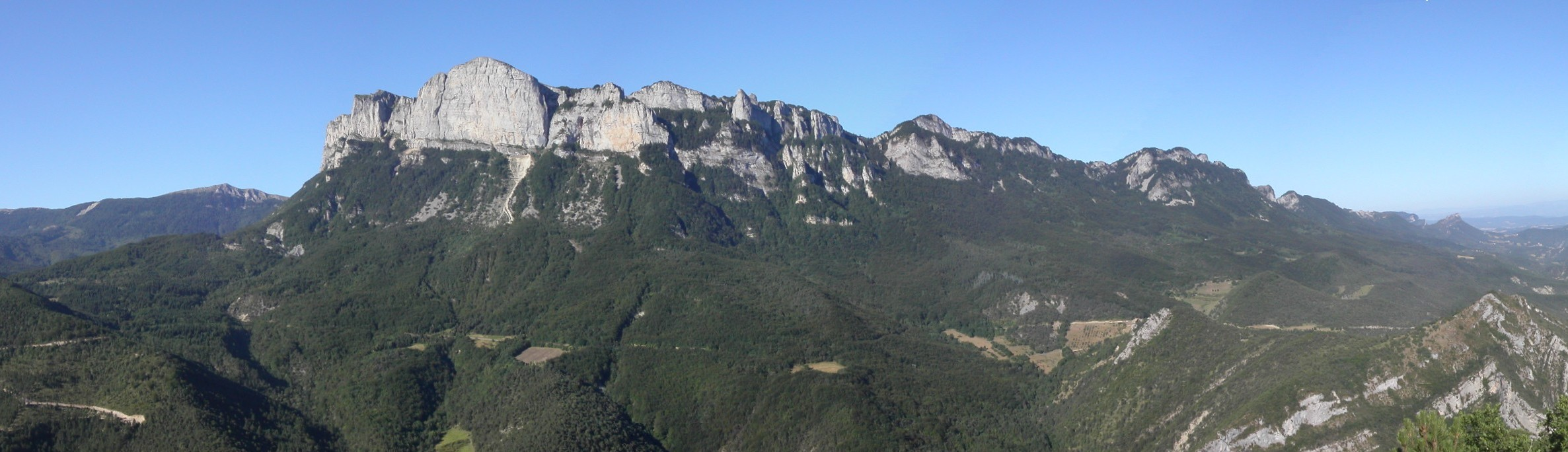 Utilisateur:Donsez Les trois becs du massif de la forêt de Saou vu du Crestas au dessus du village d'Espenel